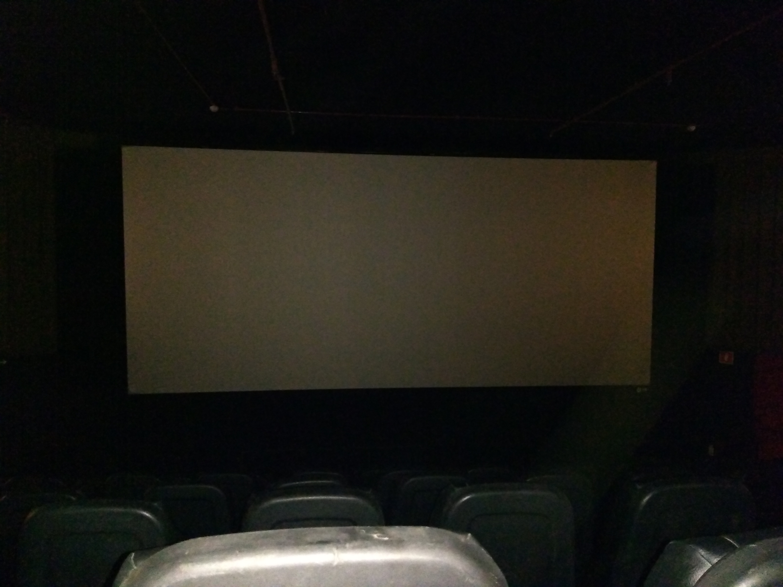 Mobi Cine Salvador: primeiro complexo da rede de cinemas em uma capital